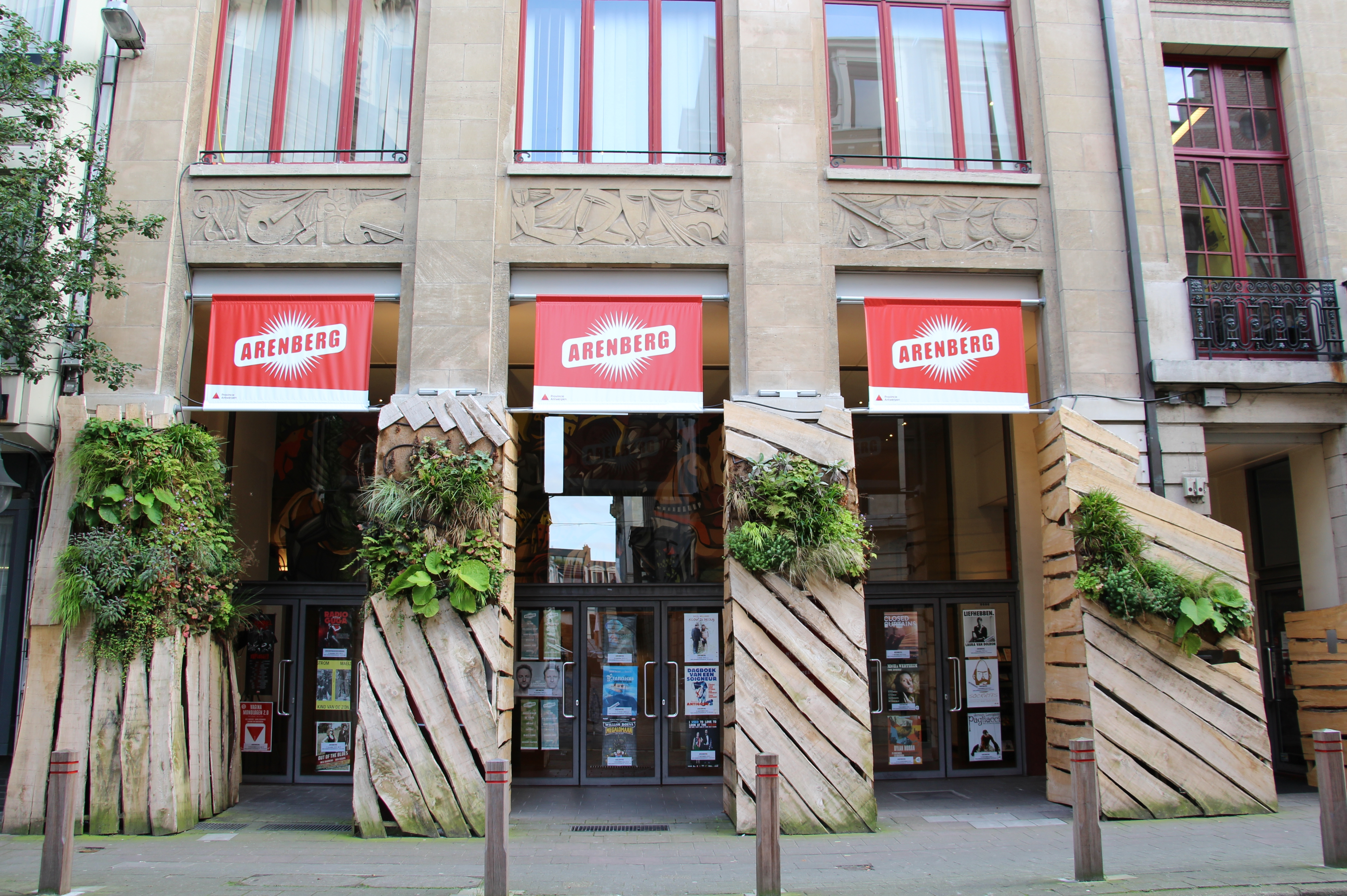 Arenbergstraat Arenberg theatre. Arch. Rie Haan 1971